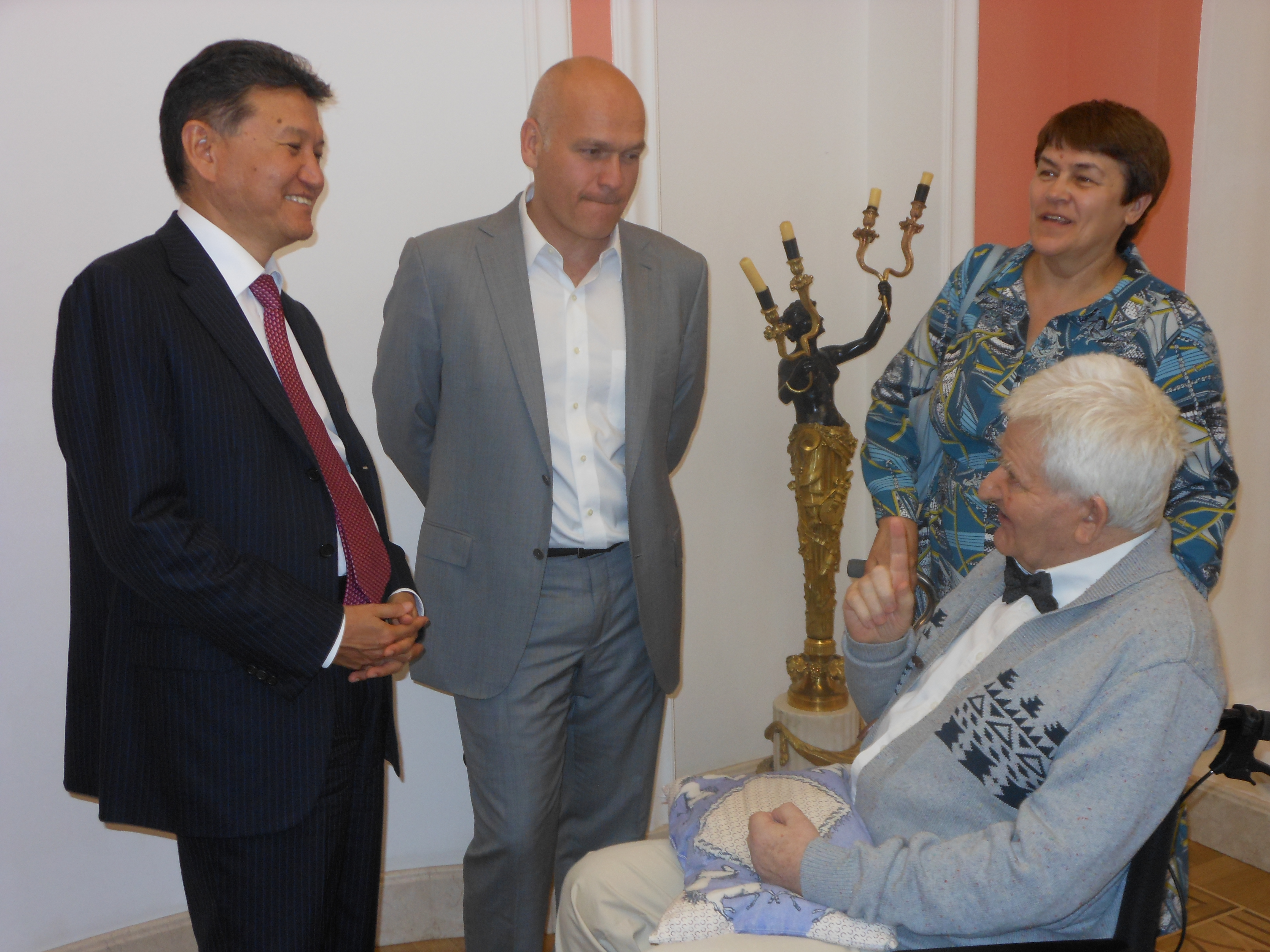 Кирсан Илюмжинов, президент РШФ Андрей Филатов, 10-й чемпион мира Борис Спасский и его гражданская жена Валентина Кузнецова на Международном дне шахмат